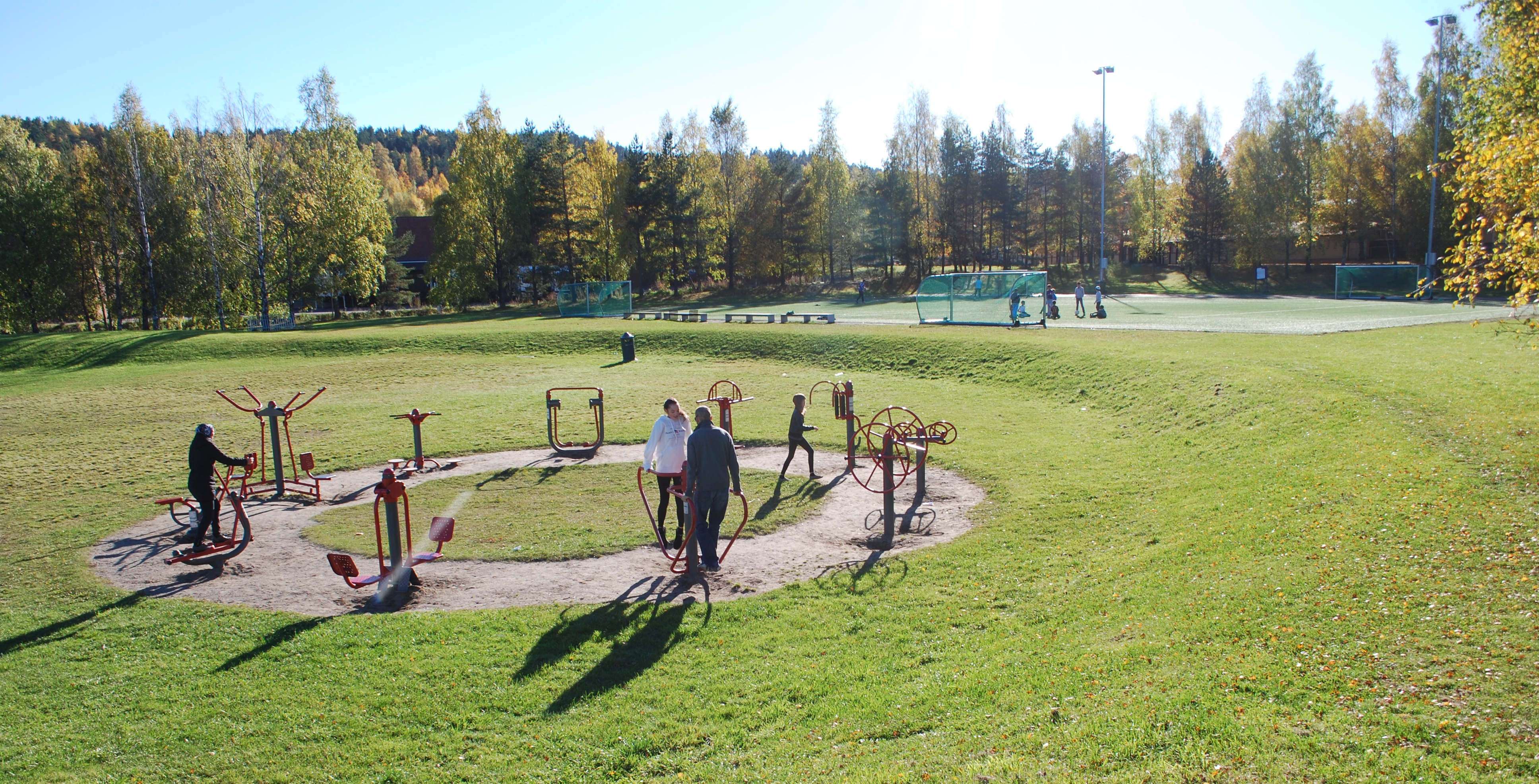 Furuset aktivitetspark, Furuset, Oslo, sørvestlige del med fotballbane